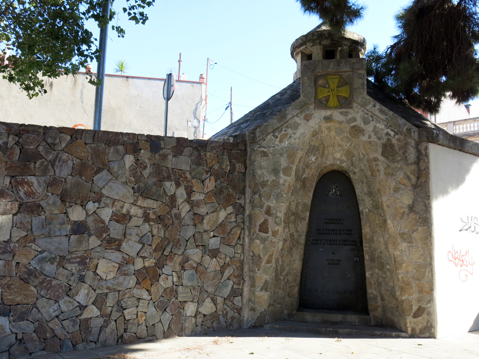 Cementiri Vell de Santa Coloma de Gramenet